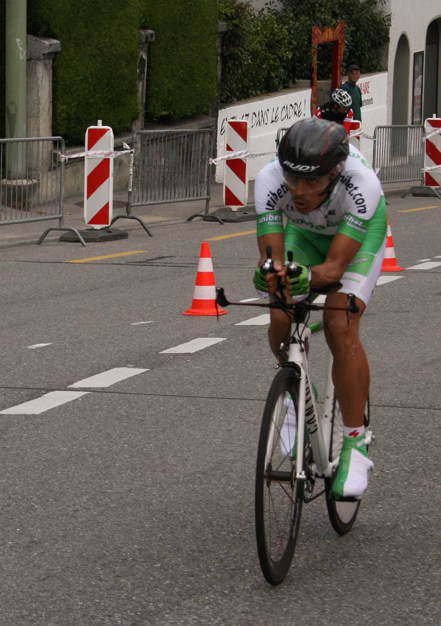 Victor_Hugo_Pena prologue du Tour de Romandie 2007